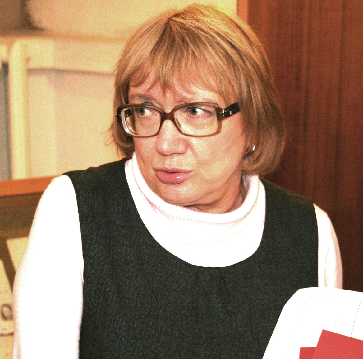 Sirje Olesk Kirjanike Liidu üldkogu Tartus 23. märtsil 2012.